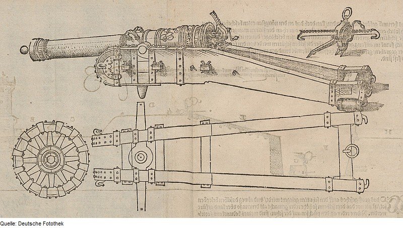 Original image description from the Deutsche Fotothek Kriegskunst & Kanone